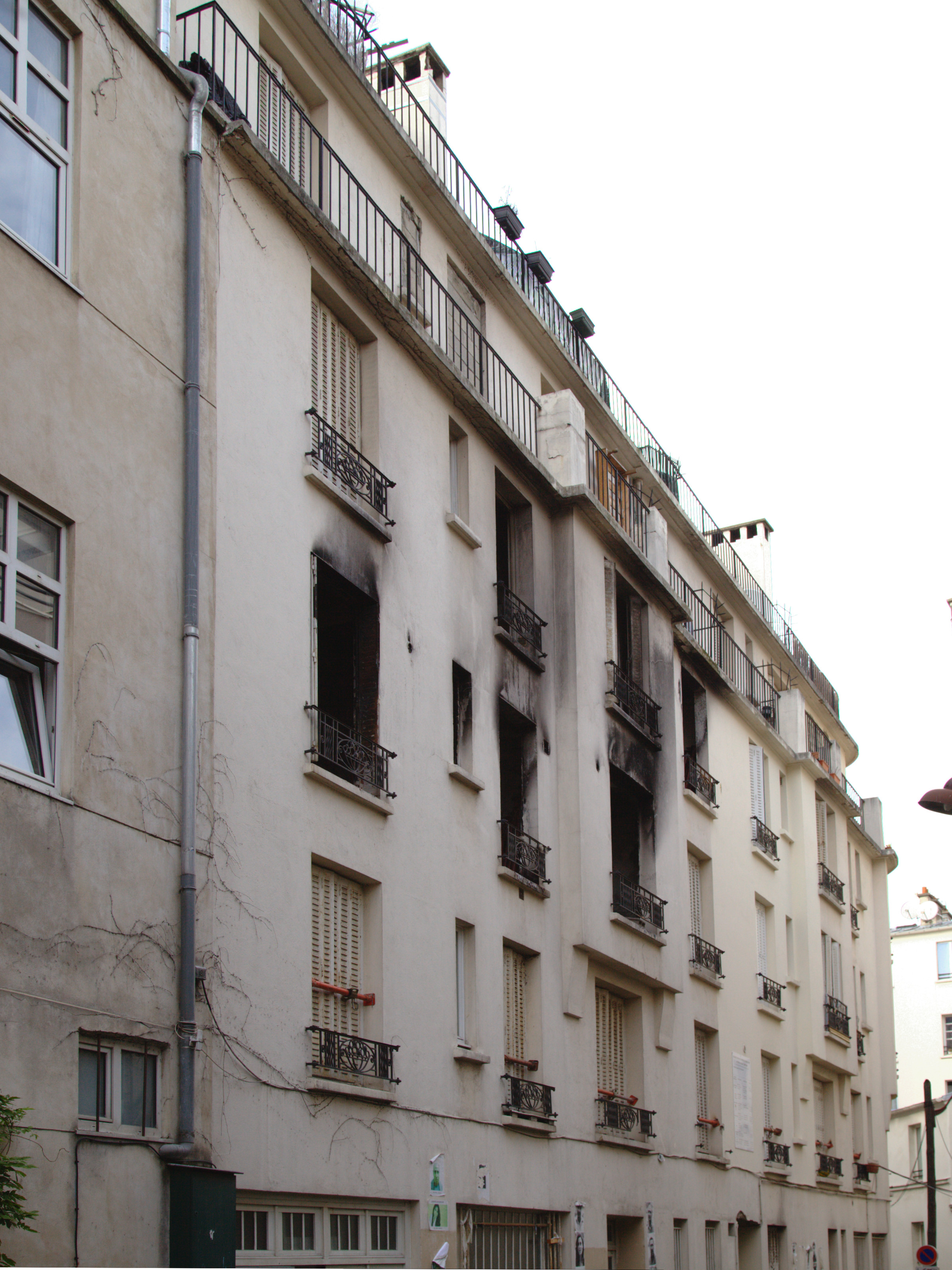 Le numéro 6 de la cité du Labyrinthe à Paris